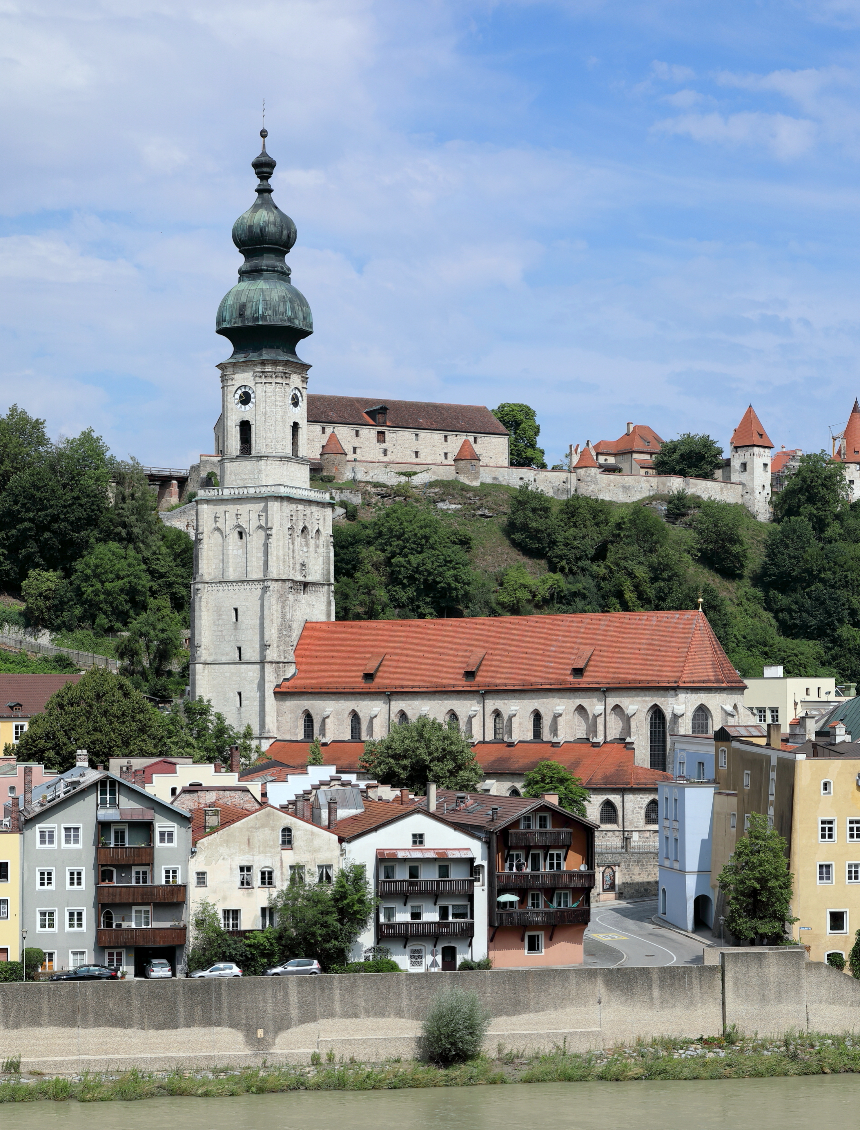 Südostansicht der röm.-kath. Stadtpfarrkirche St. Jakob in der deutschen Herzogstadt Burghausen im oberbayerischen Landkreis Altötting und im Hintergrund der zweite Vorhof der Burg zu Burghausen mit dem Zeughaus.